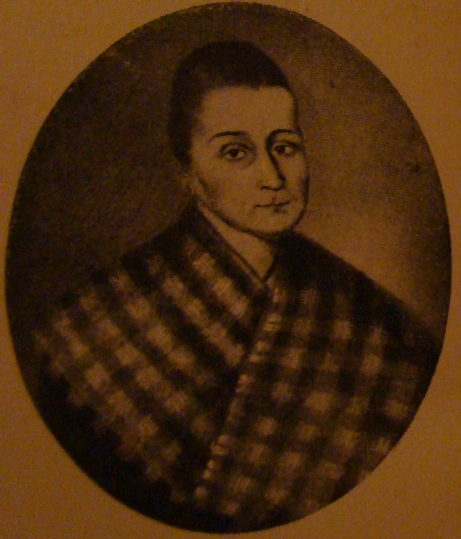 Retrato de Micaela Suárez de Romero (1774-1830)